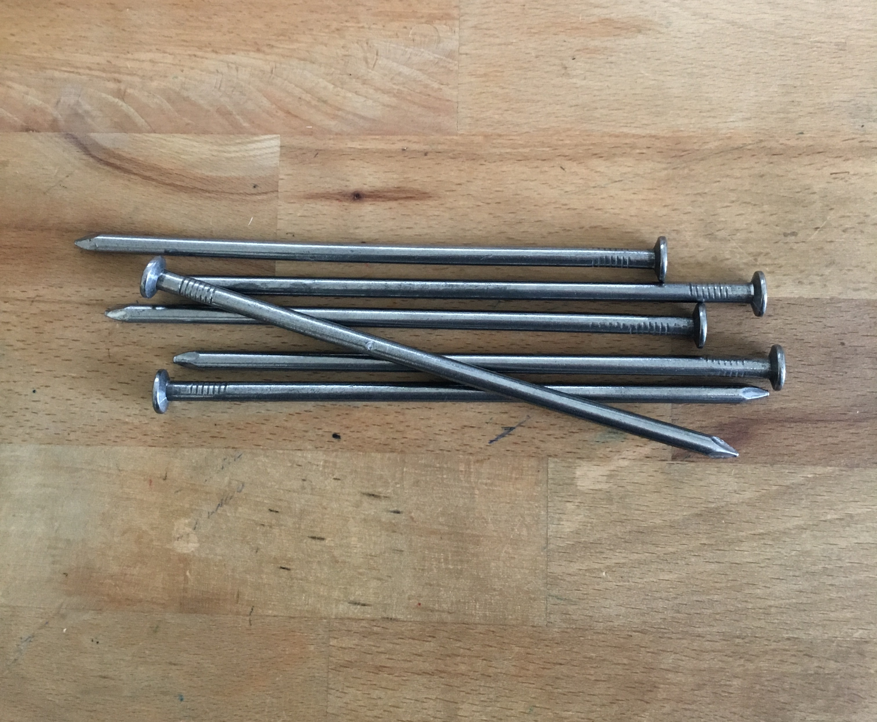 Zimmermannsnägel